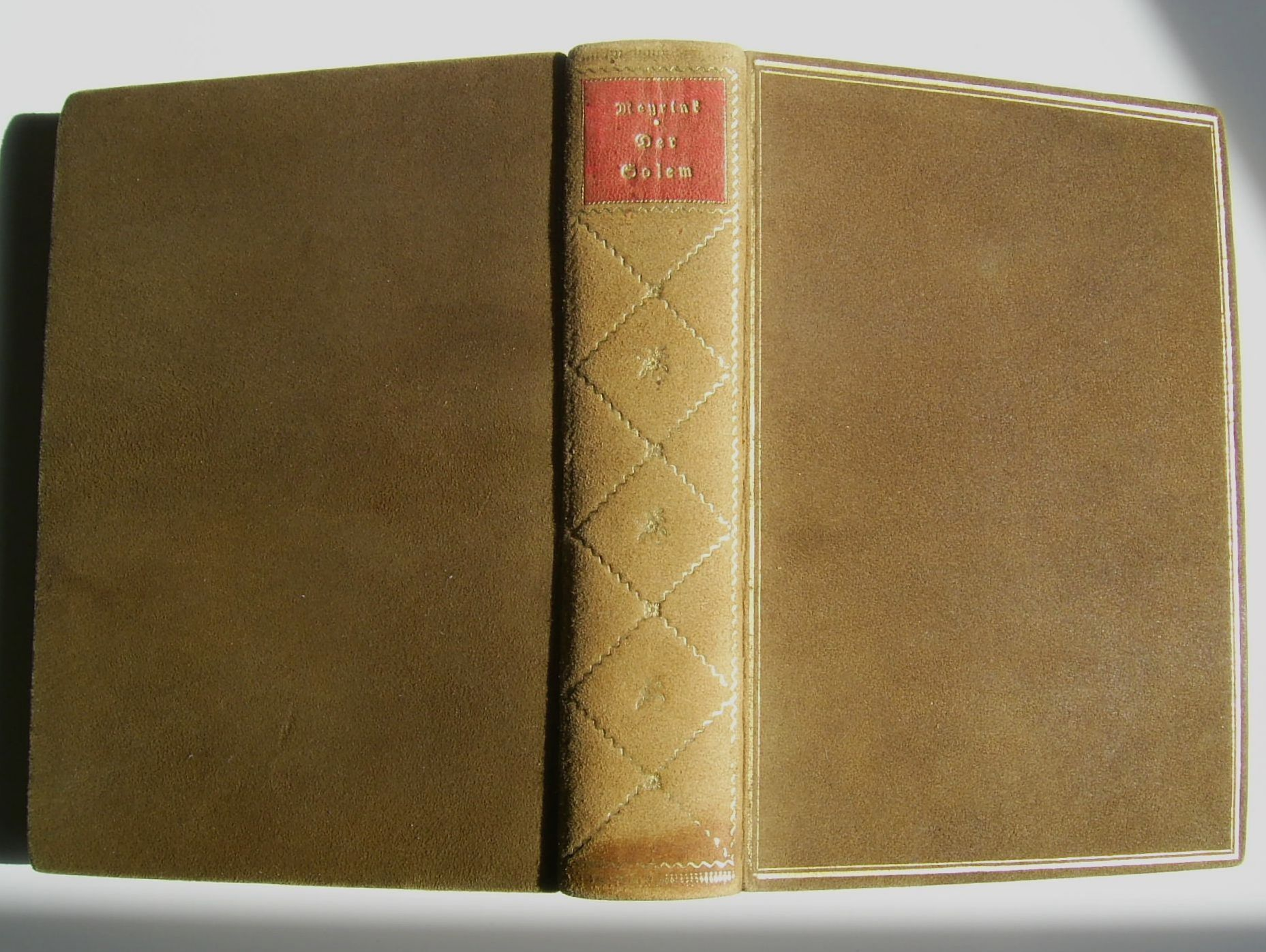 Gustav Meyrink - Der Golem, Verlagseinband der Vorzugsausgabe, Kurt Wolff Verlag 1915